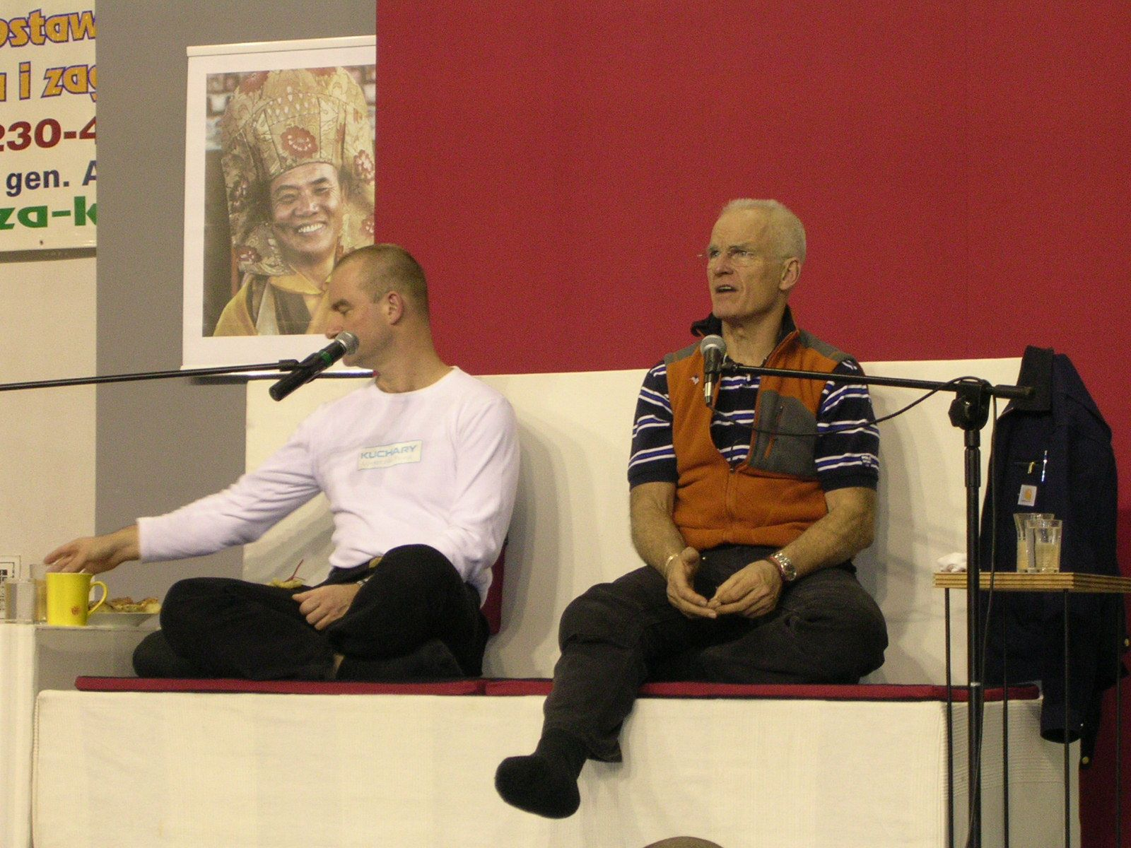 Lama Ole Nydahl, 9.12.2004 Wrocław fot: Piotr Czerniawski